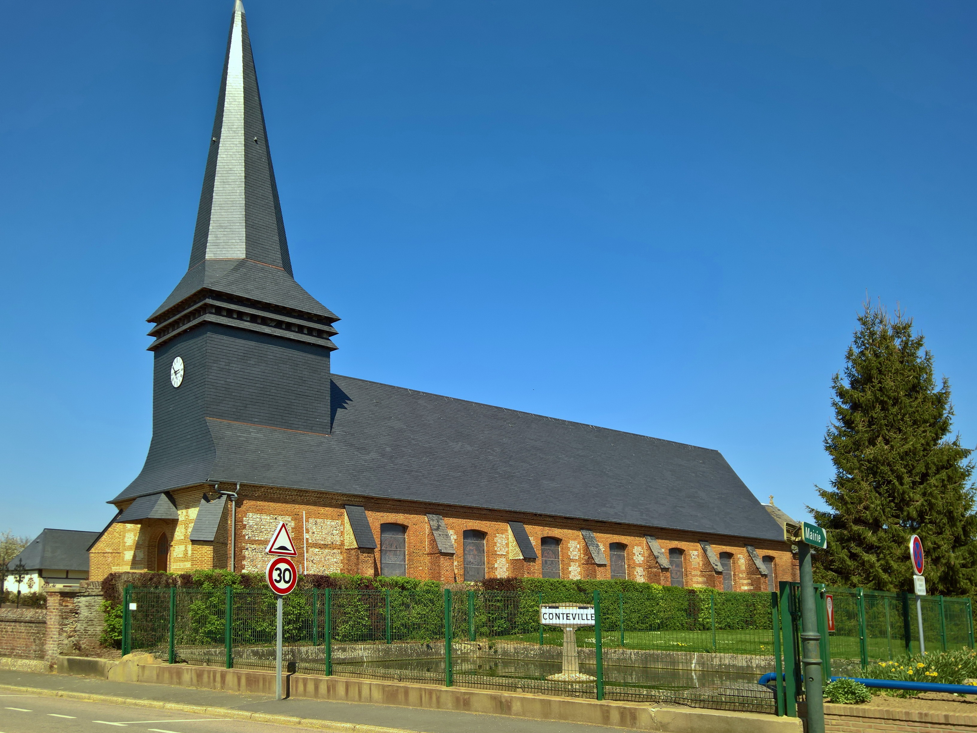 Conteville (76) : L'église Saint-Nicolas et ancienne plaque Michelin dans la mare